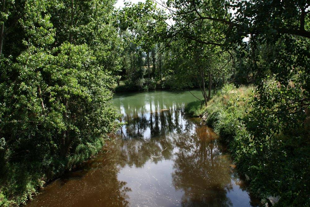 Desembocadura del río Bayas en Miranda de Ebro (provincia de Burgos, Castilla y León).